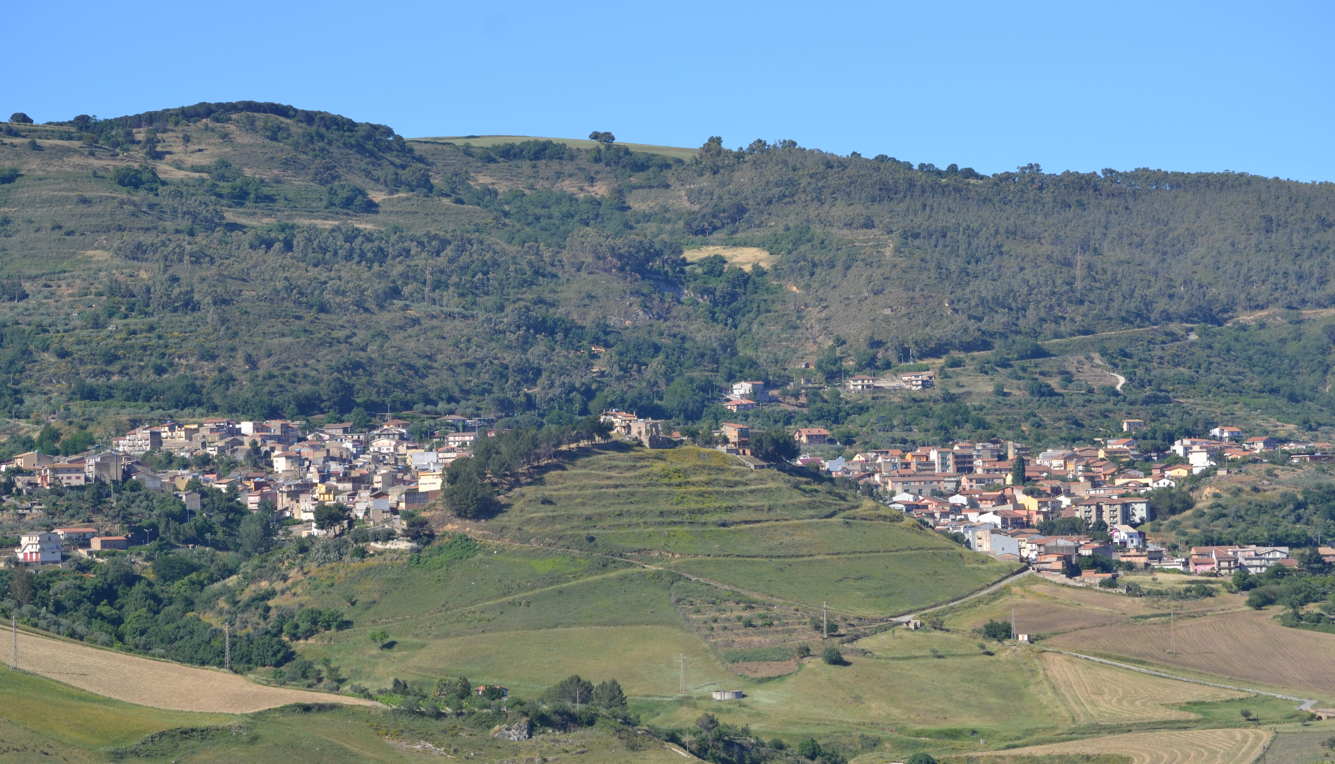 Veduta di San Michele di Ganzaria a piedi della Montagna Ganzaria. Foto scattata personalmente.